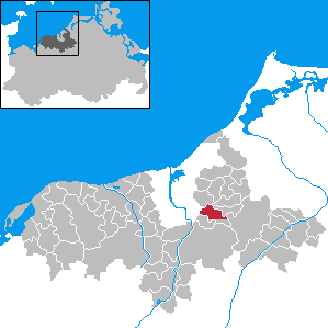 Broderstorf in Mecklenburg-Western Pomerania - District Bad Doberan